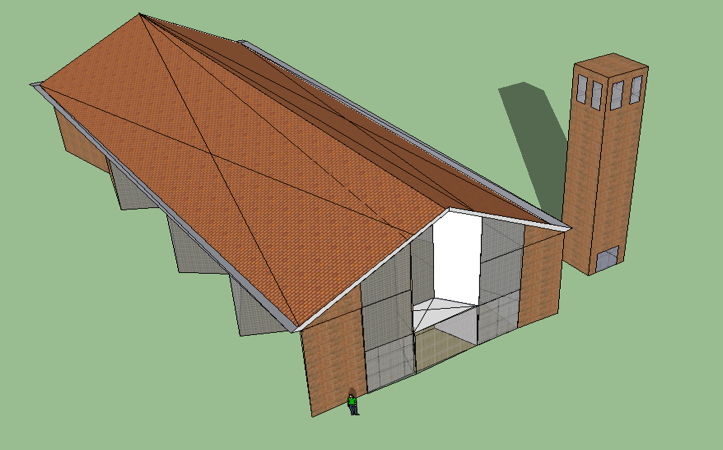 vista general